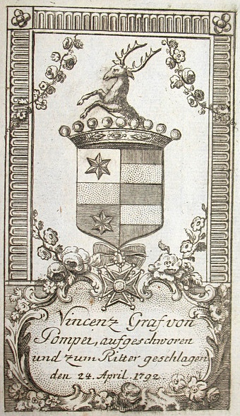 Vincenz von Pompei (1763-1849), bayerischer General, Wappen als Georgsritter